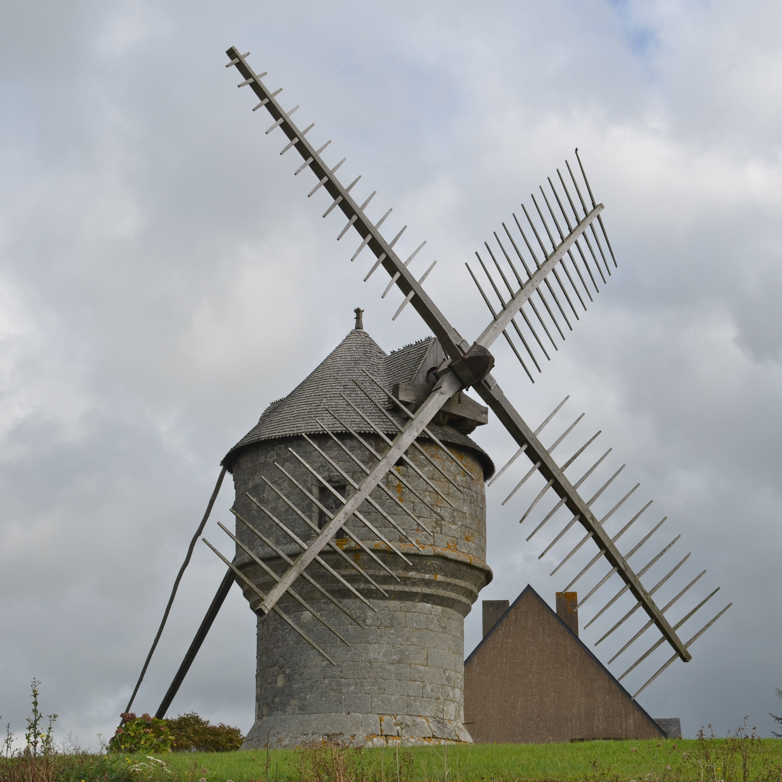 Moulin de Crémeur du 15e s. - Guérande